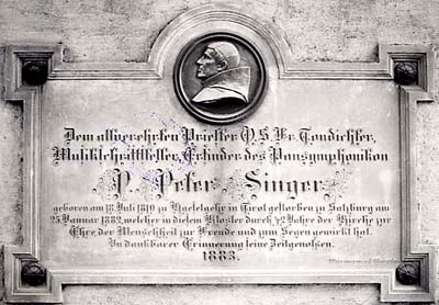 Gedenktafel Pater Peter Singer (Franziskanergasse)